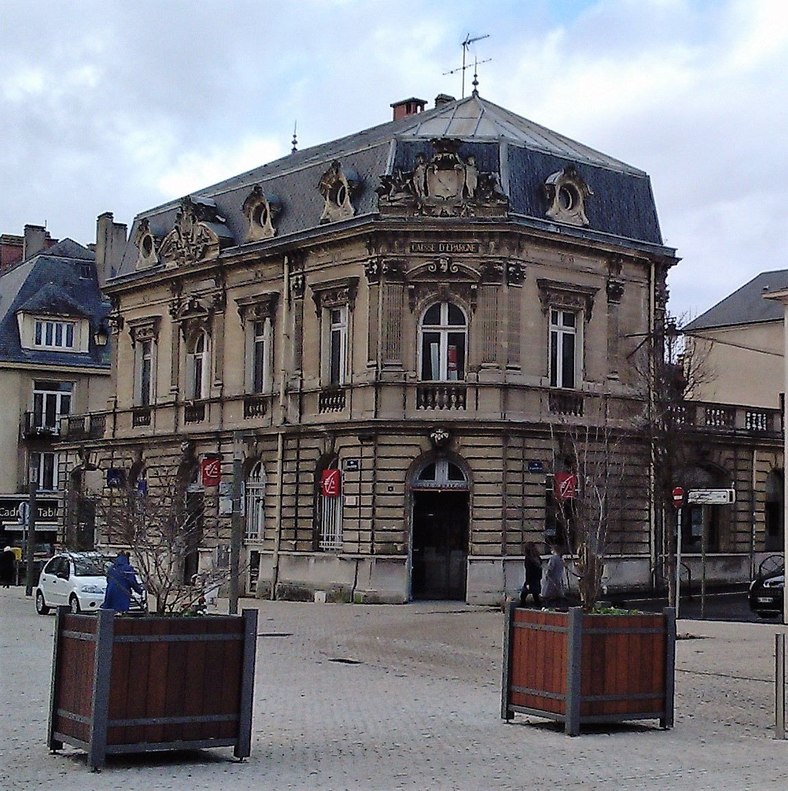 Caisse d'épargne d'Evreux (Eure).